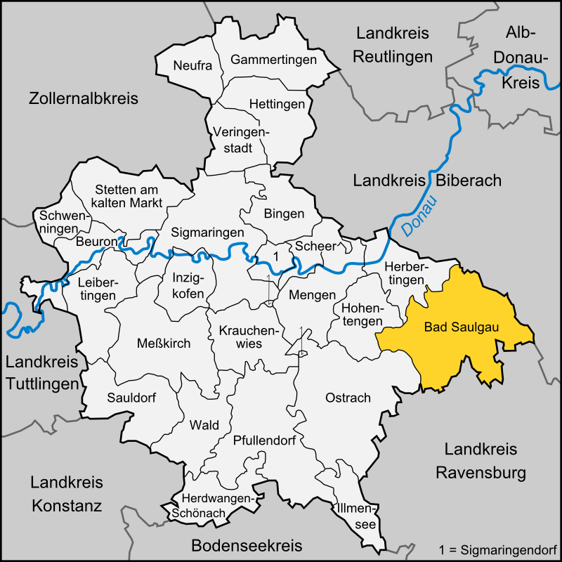 Karte der Stadt Bad Saulgau im Landkreis Sigmaringen